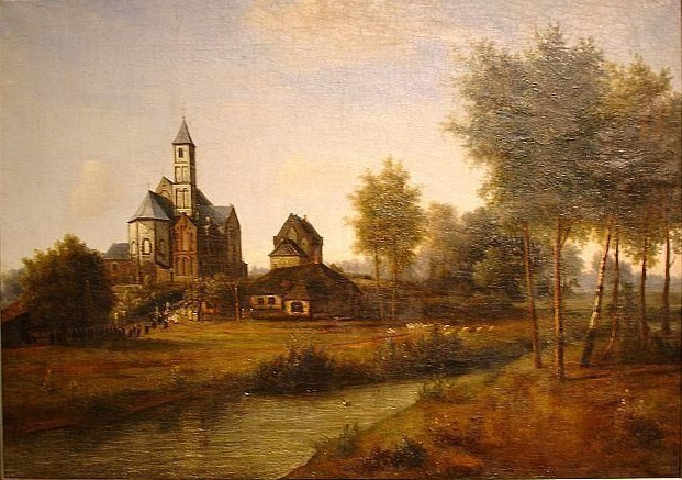 Basiliek te Sint Odiliënberg voor de restauratie door Pierre Cuypers.